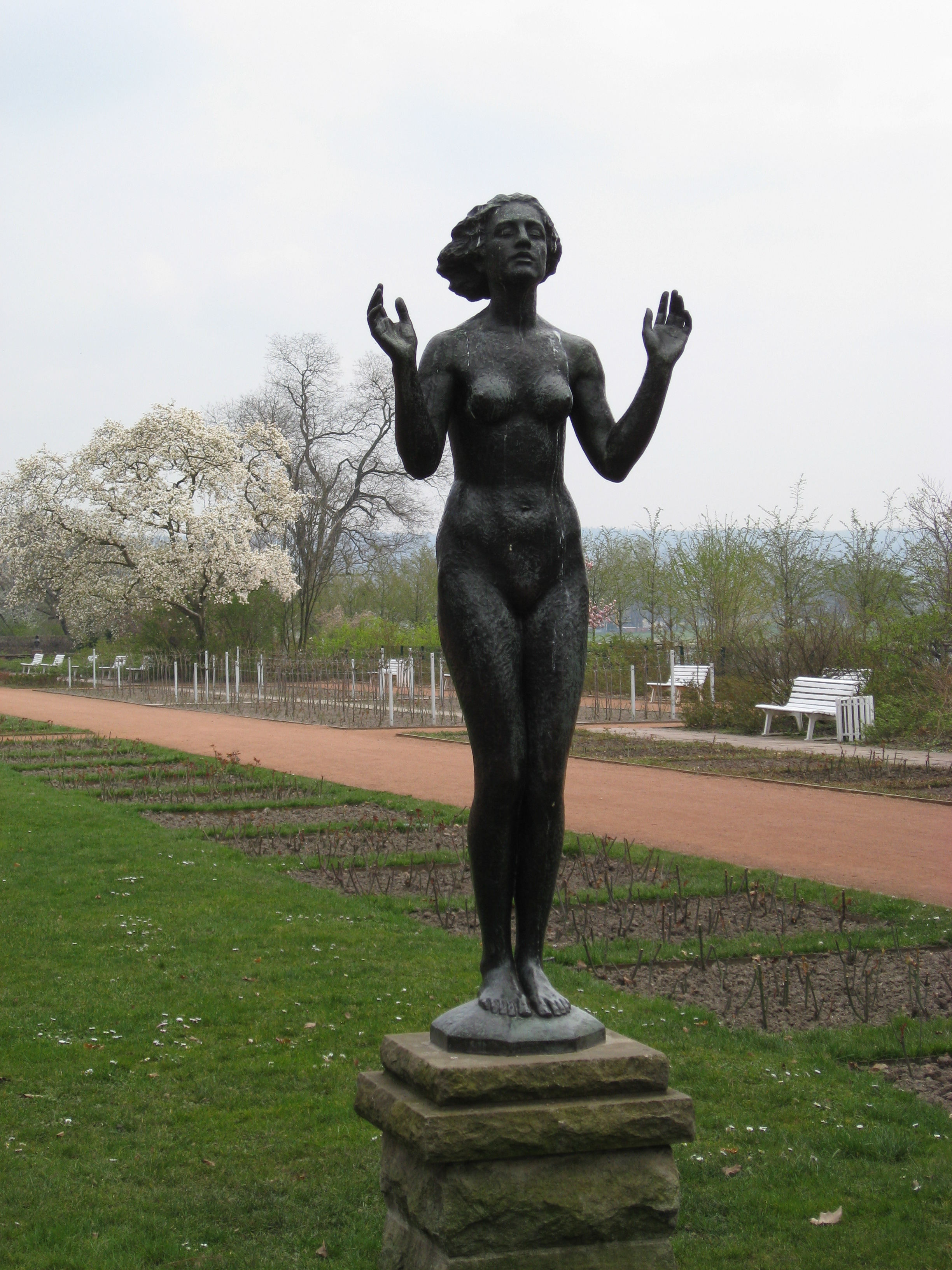 Die Plastik "Genesung" im Rosengarten in Dresden.